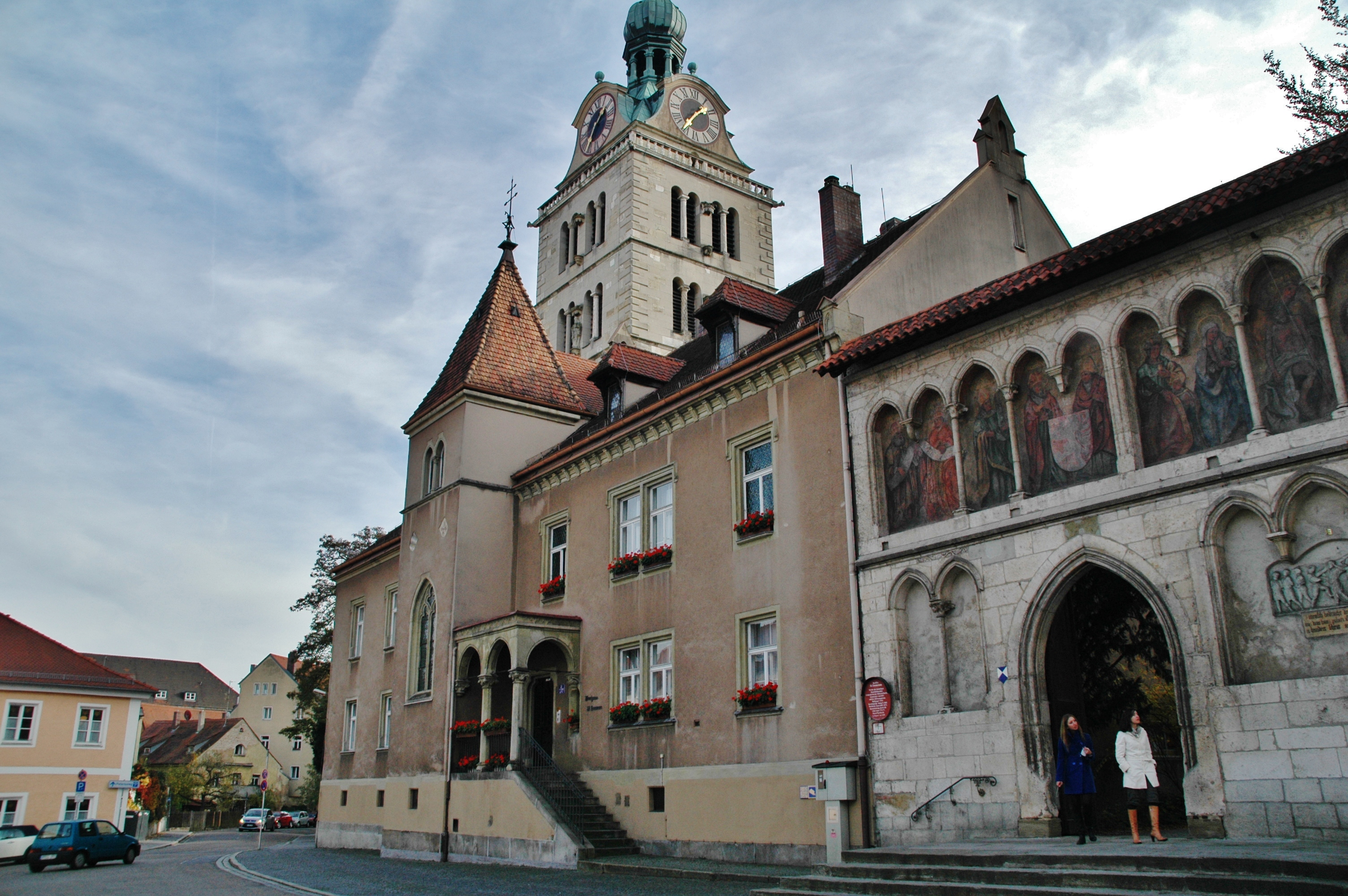 St. Emmeram (Schloss der Fürstin Thurn und Taxis)